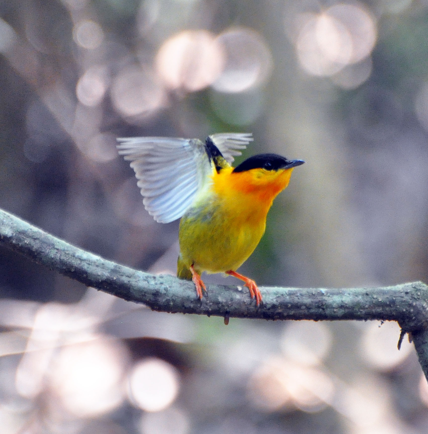 Manacus aurantiacus 27-Mar-12 Carara National Park, Costa Rica